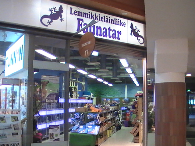 Faunatarin lemmikkimyymälä Kauppakeskus Myllyssä.